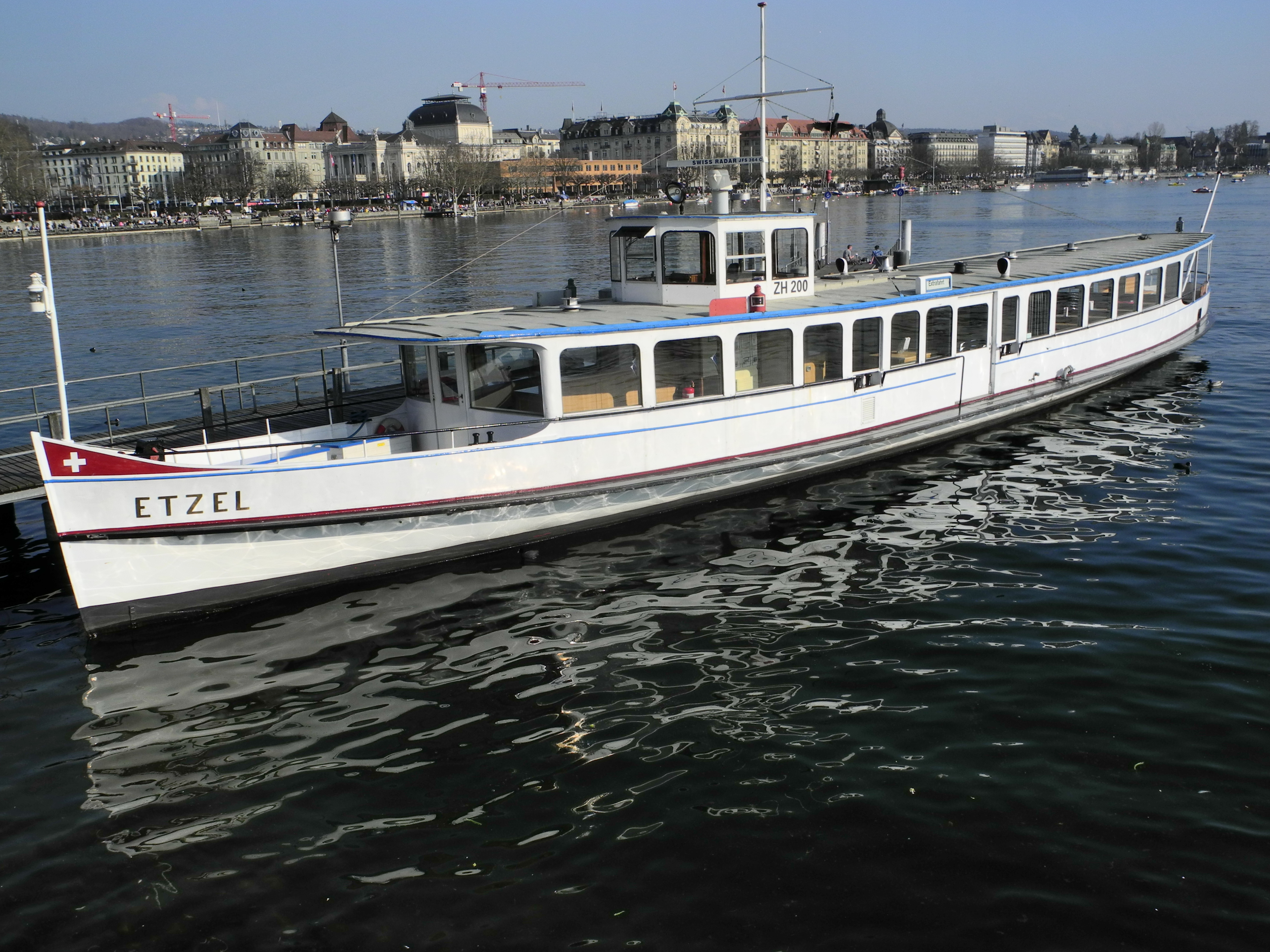 Former Zürichsee-Schifffahrtsgesellschaft (ZSG) MS Etzel at Bürkliplatz (Alpenquai) in Zürich (Switzerland)